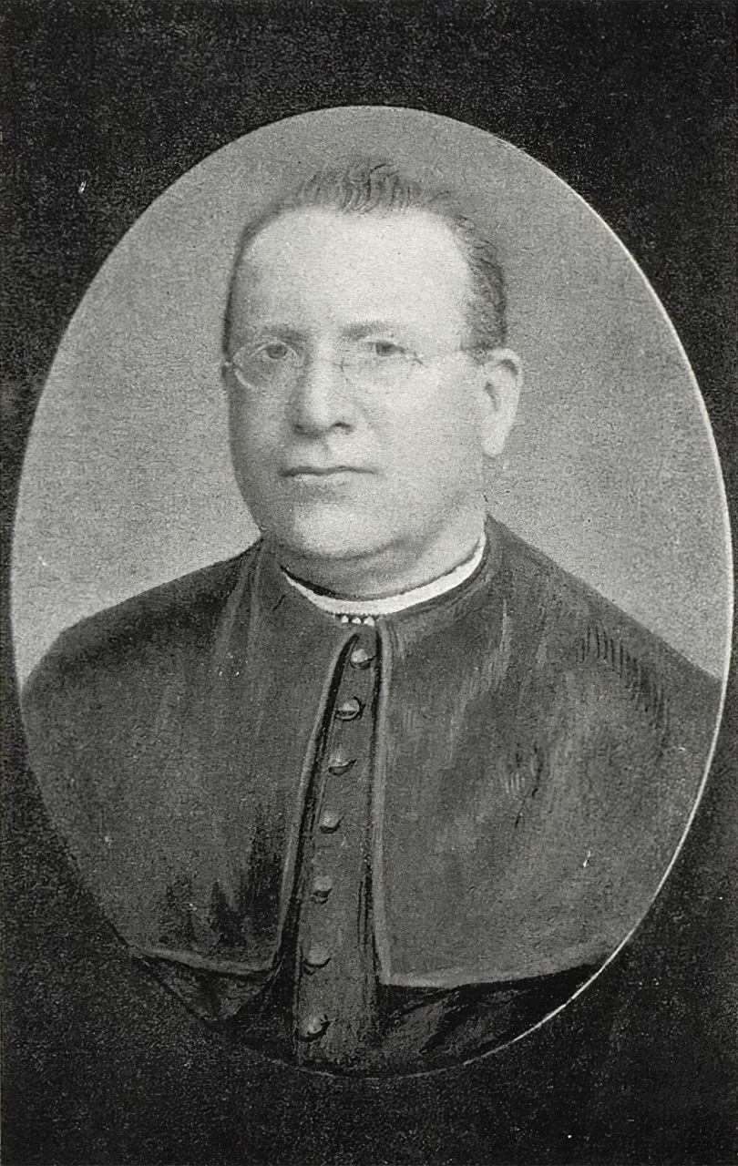 František Wildmann